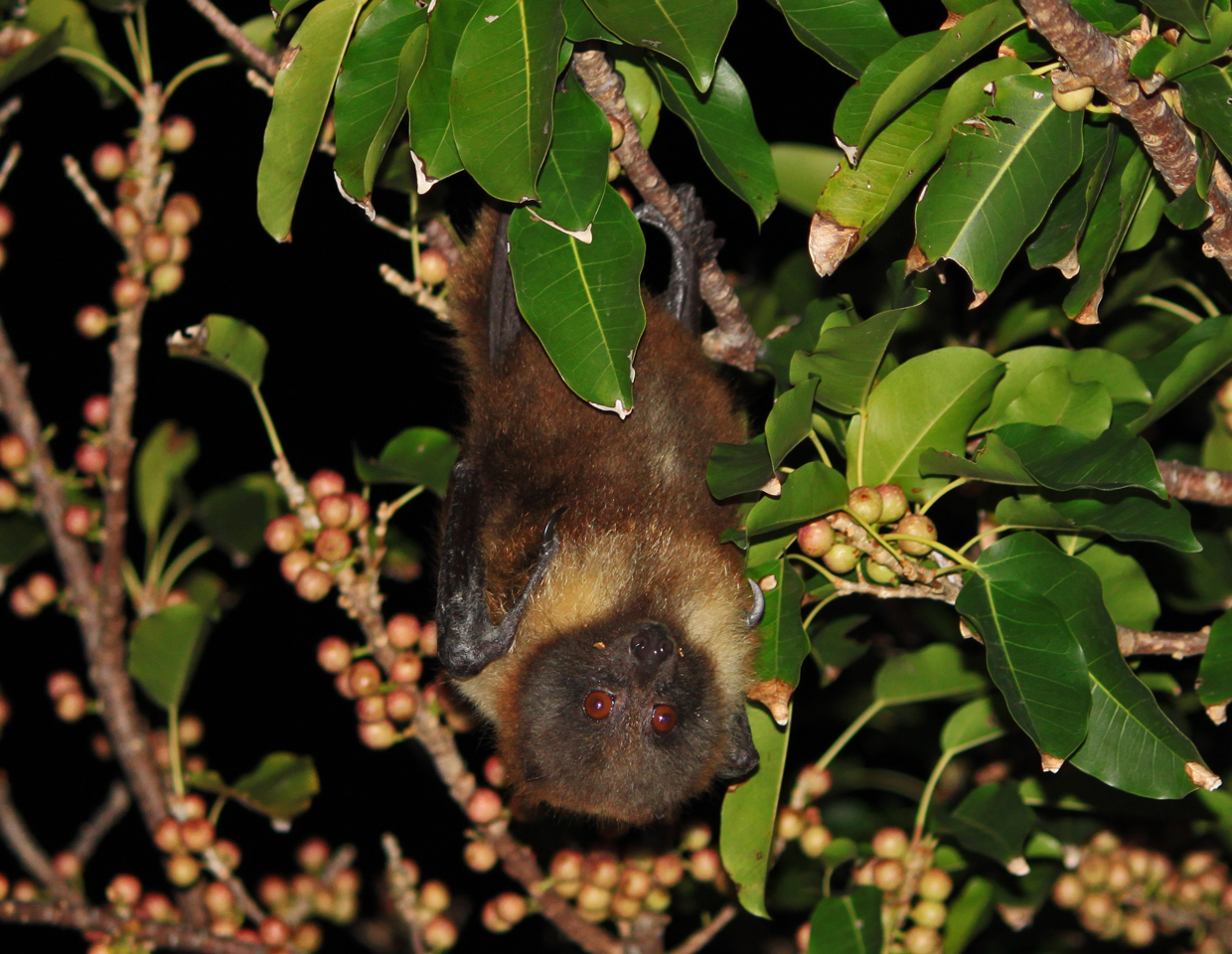 Ryukyu Flying Fox(Pteropus dasymallus sp. yayeyamae) at Kohama Island. クビワオオコウモリ亜種ヤエヤマオオコウモリ。